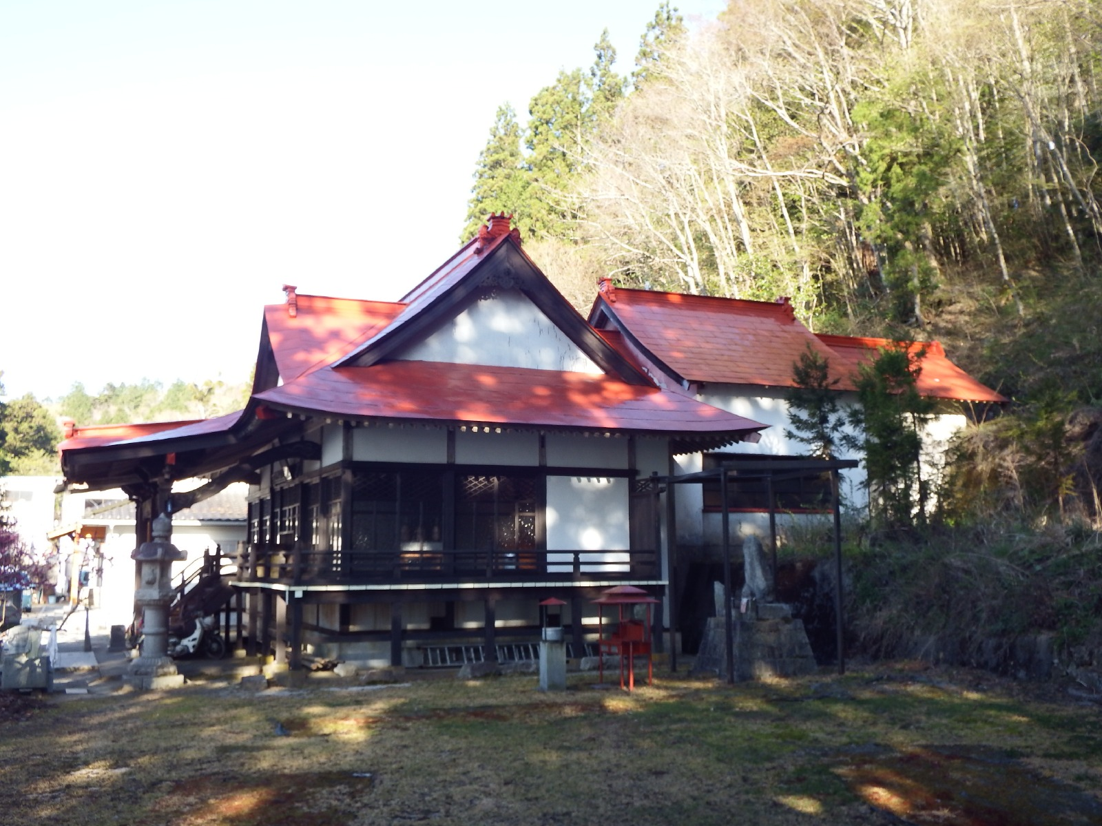 大瀧寺の本堂